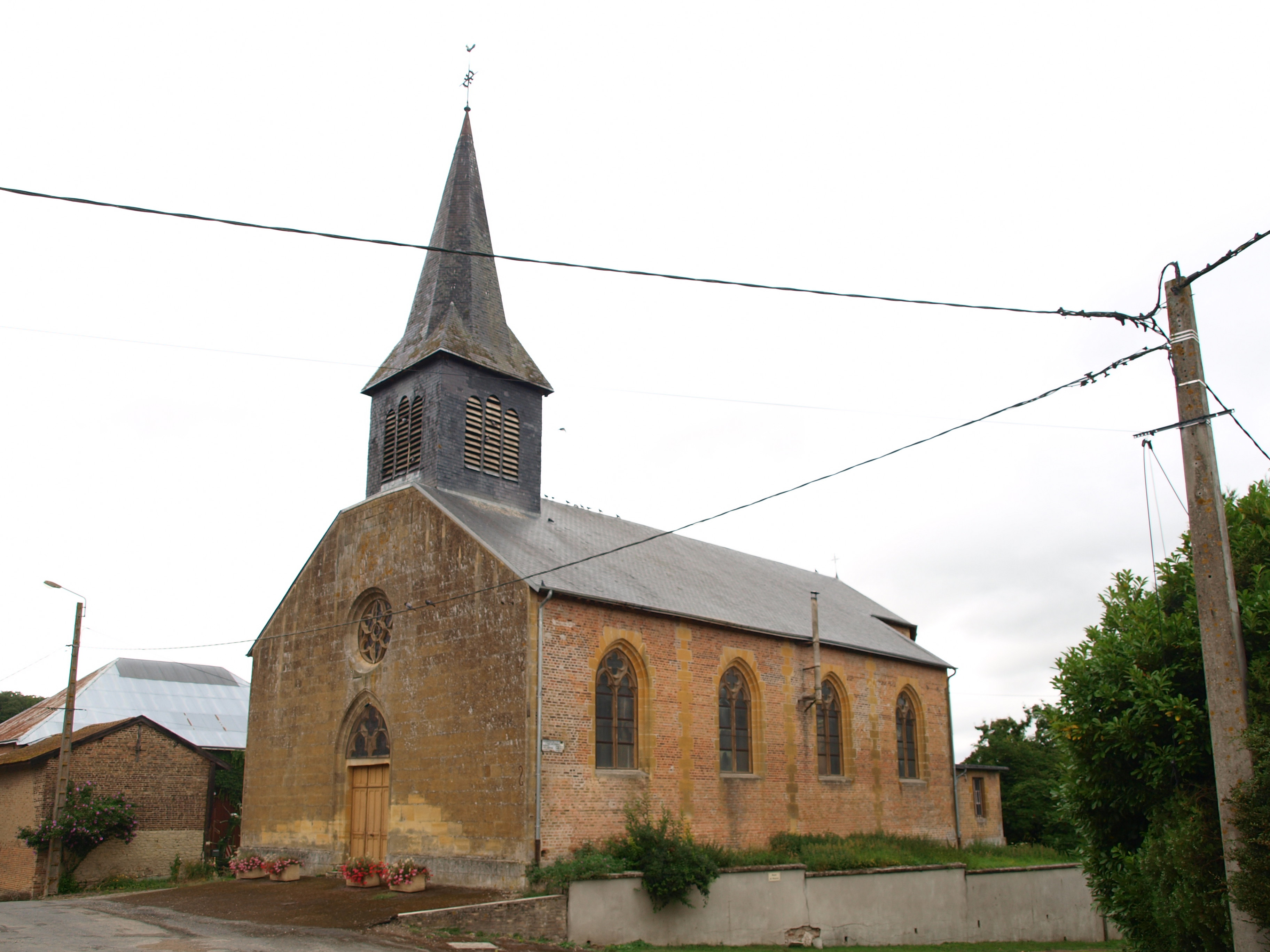 Vaux-lès-Mouron (Ardennes, France) ; église